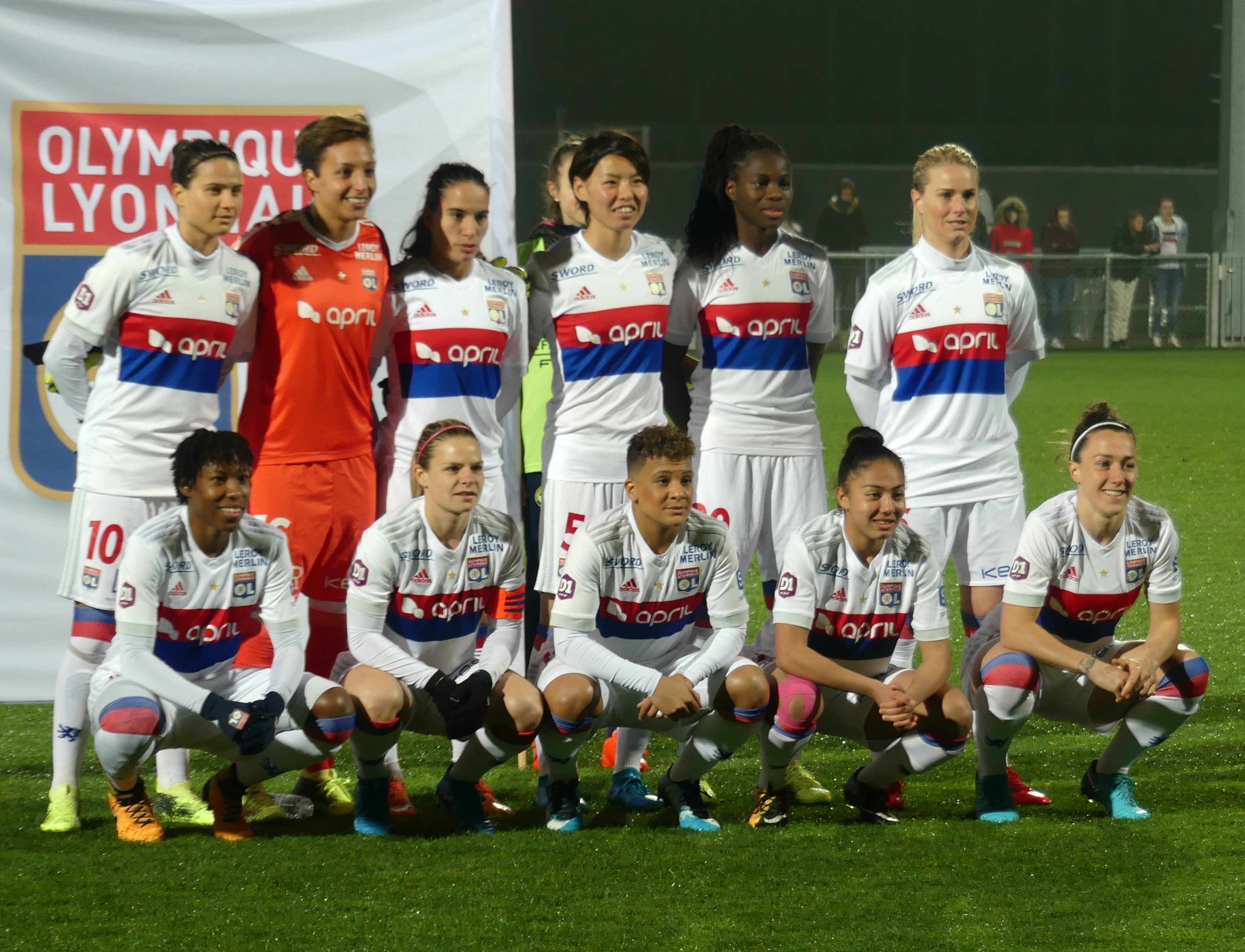 Effectif titulaire de l'Olympique lyonnais féminin lors du match contre Montpellier en championnat le 5 février 2018. (de gauche à droite) Haut : Dzsenifer Marozsán, Sarah Bouhaddi, Amel Majri, Saki Kumagai (熊谷紗希), Griedge Mbock, Amandine Henry - Bas : Kadeisha Buchanan, Eugénie Le Sommer, Shanice van de Sanden, Selma Bacha, Lucy Bronze